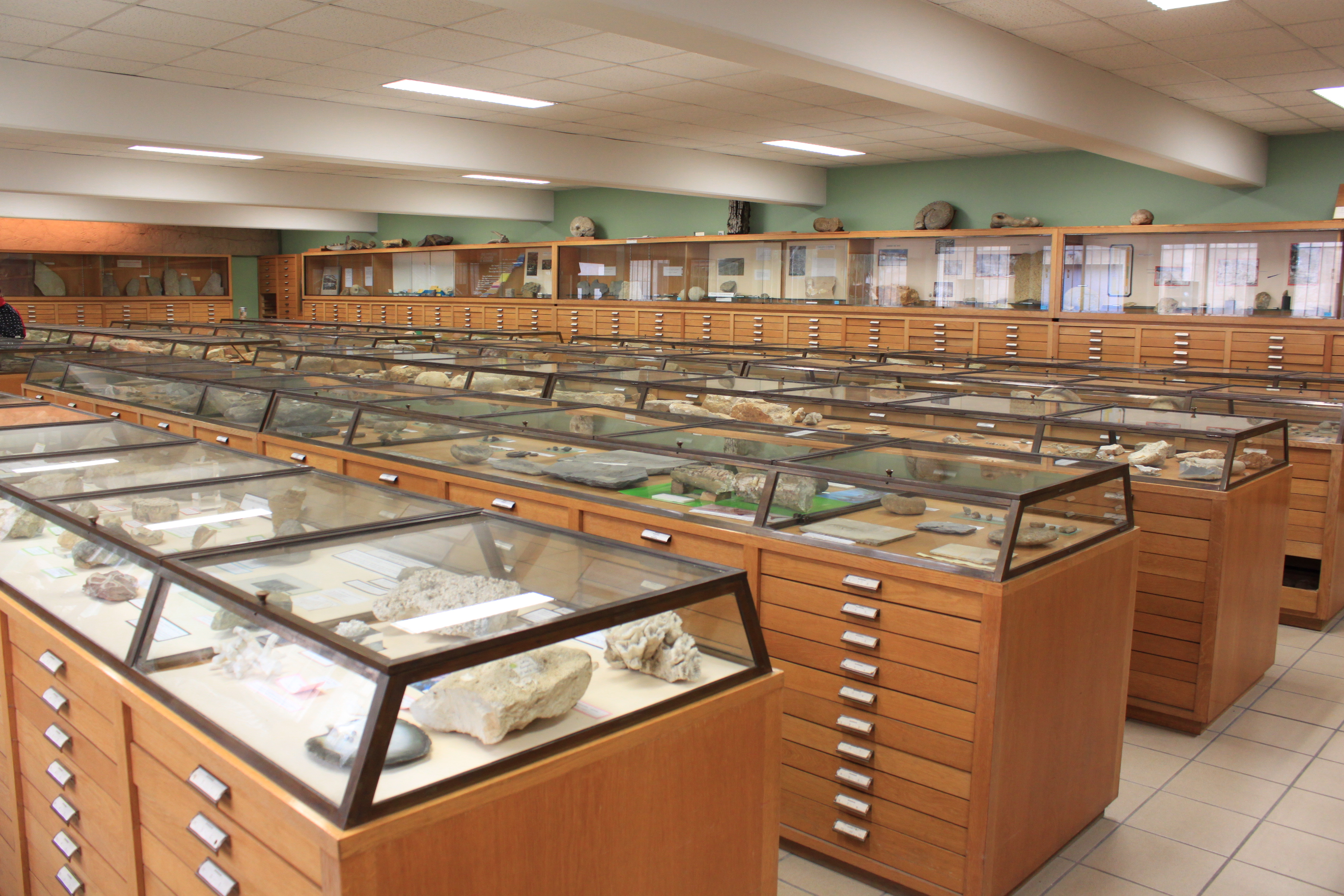 Collections scientifiques de l'Université de Bourgogne, Dijon, France